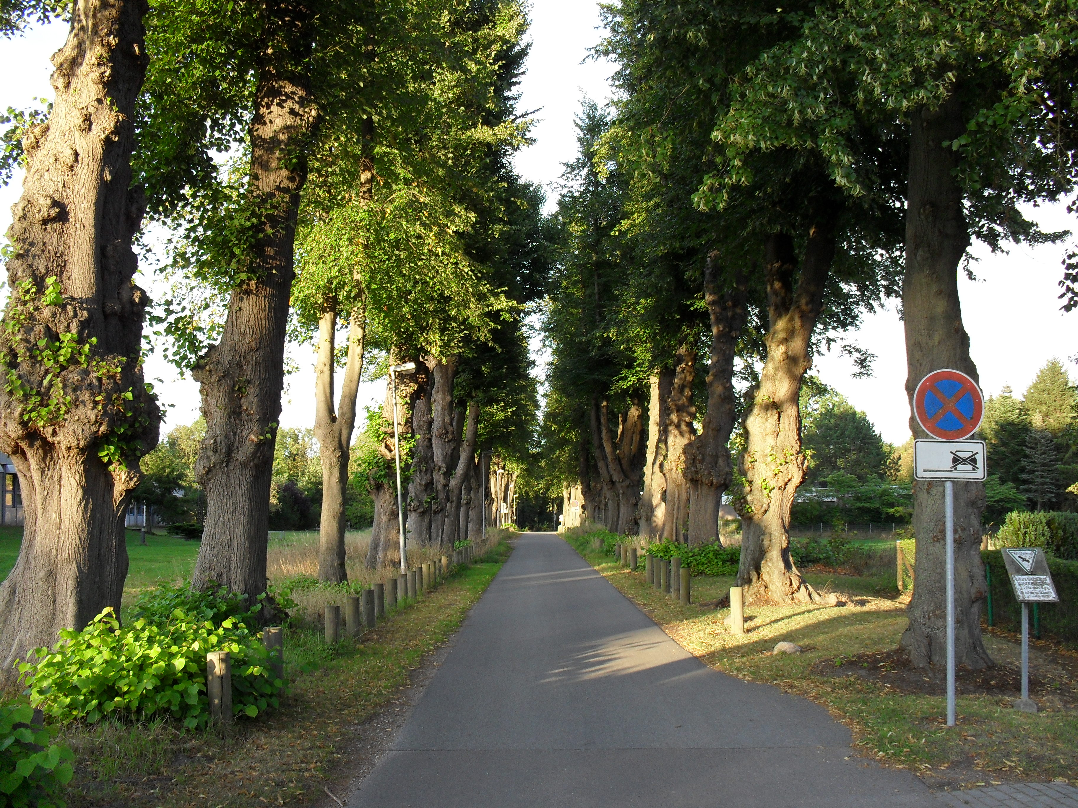 Die als Naturdenkmal geschützte Winterlindenallee von Gut Strecknitz in Lübeck